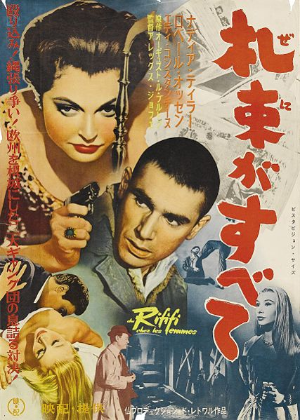 Rififi chez les femmes - poster presentación film